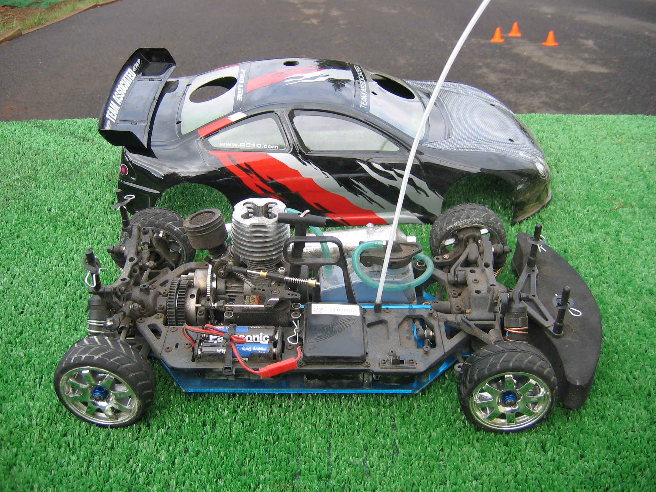 מכונית על שלט NTC3